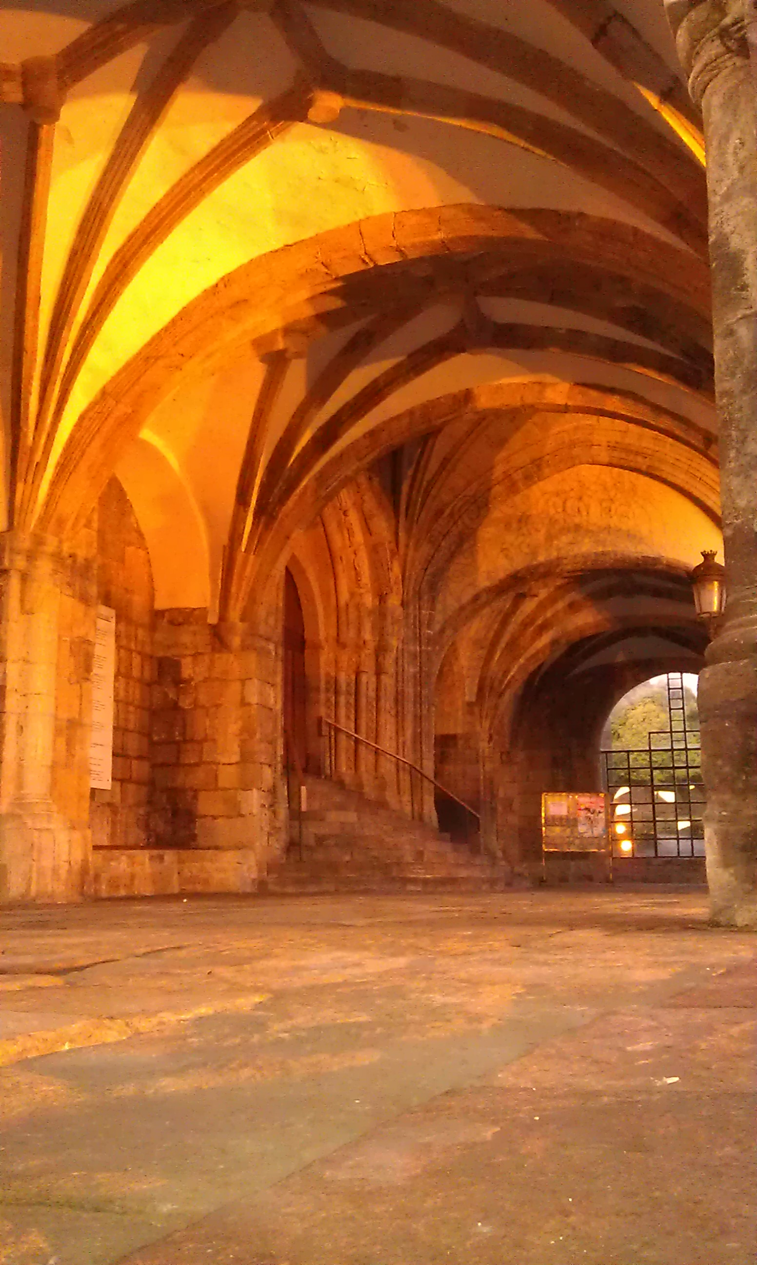 Portal de entrada a la iglesia de Nuestra Señora de la Asunción en Laredo, Cantabria, España.